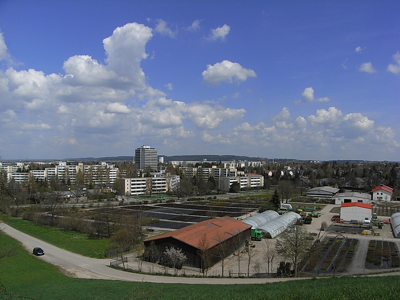 Blick über die Weststadt vom MonteSchutto aus mit Machnighochhaus, Mitteresch, Unteresch und im Hintergrund dem Stadtteil Eisenburg